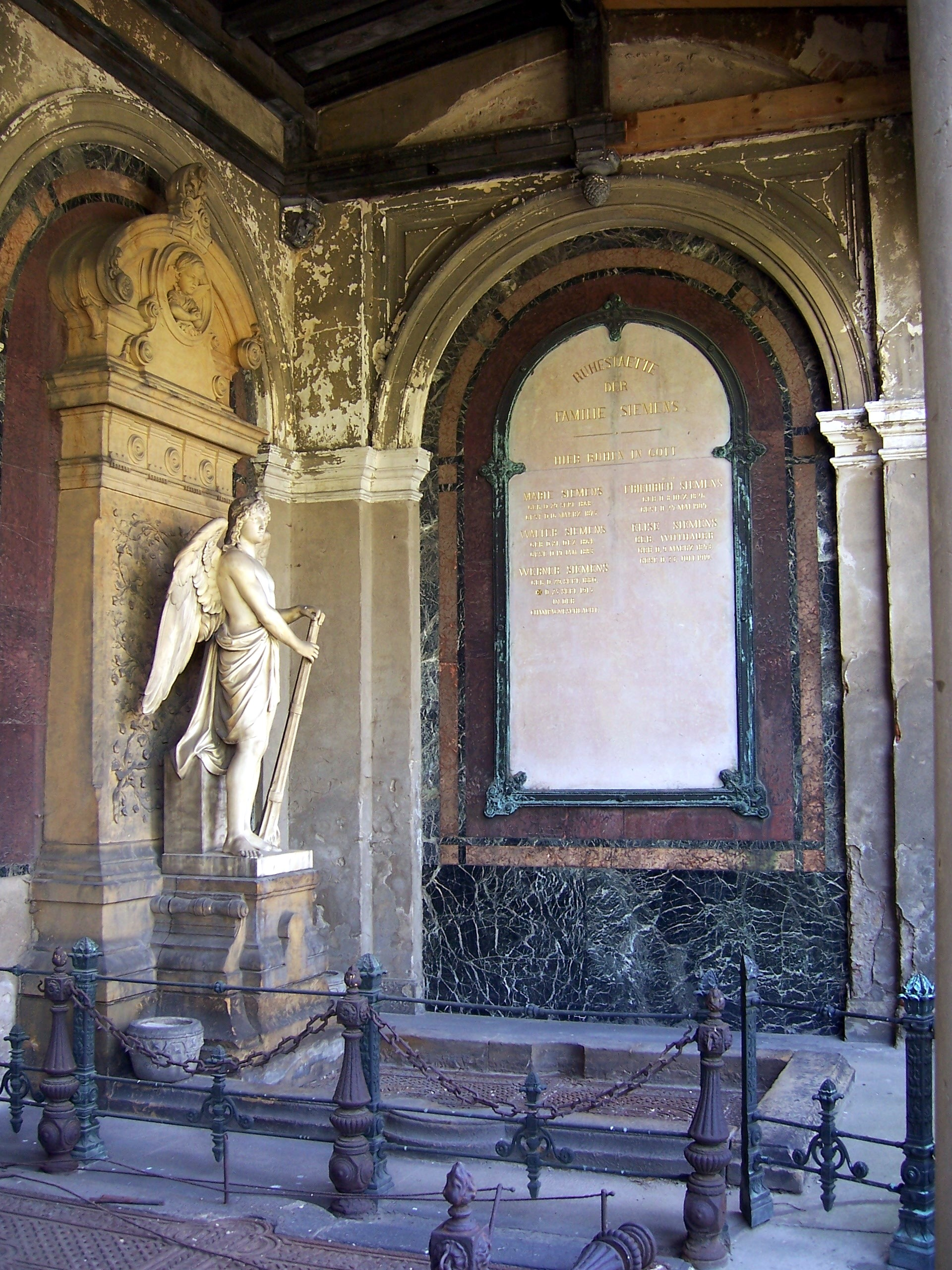 Grab des Technikers Friedrich Siemens auf dem Neuen Annenfriedhof in Dresden. Grabfigur von Johannes Schilling.